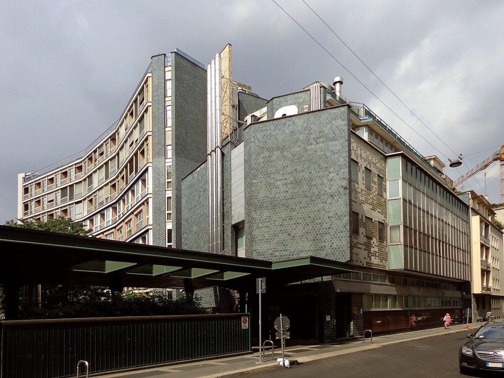 Milano, la casa di cura “La Madonnina” in via Quadronno 29-31.